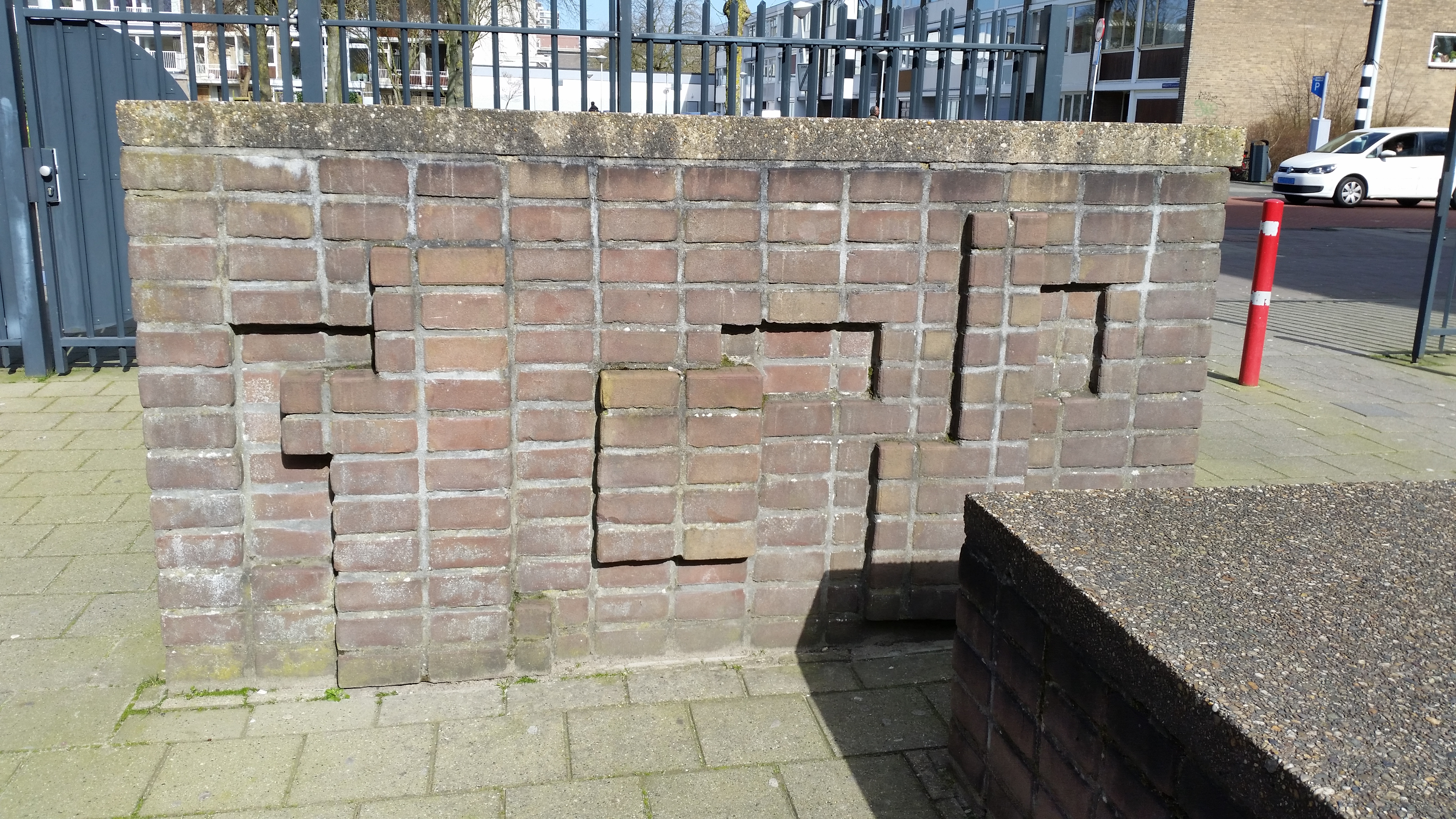 Impressie van De Cuserstraat 3, Amsterdam; schoolgebouw met kletsmuurtjes (maart 2020)